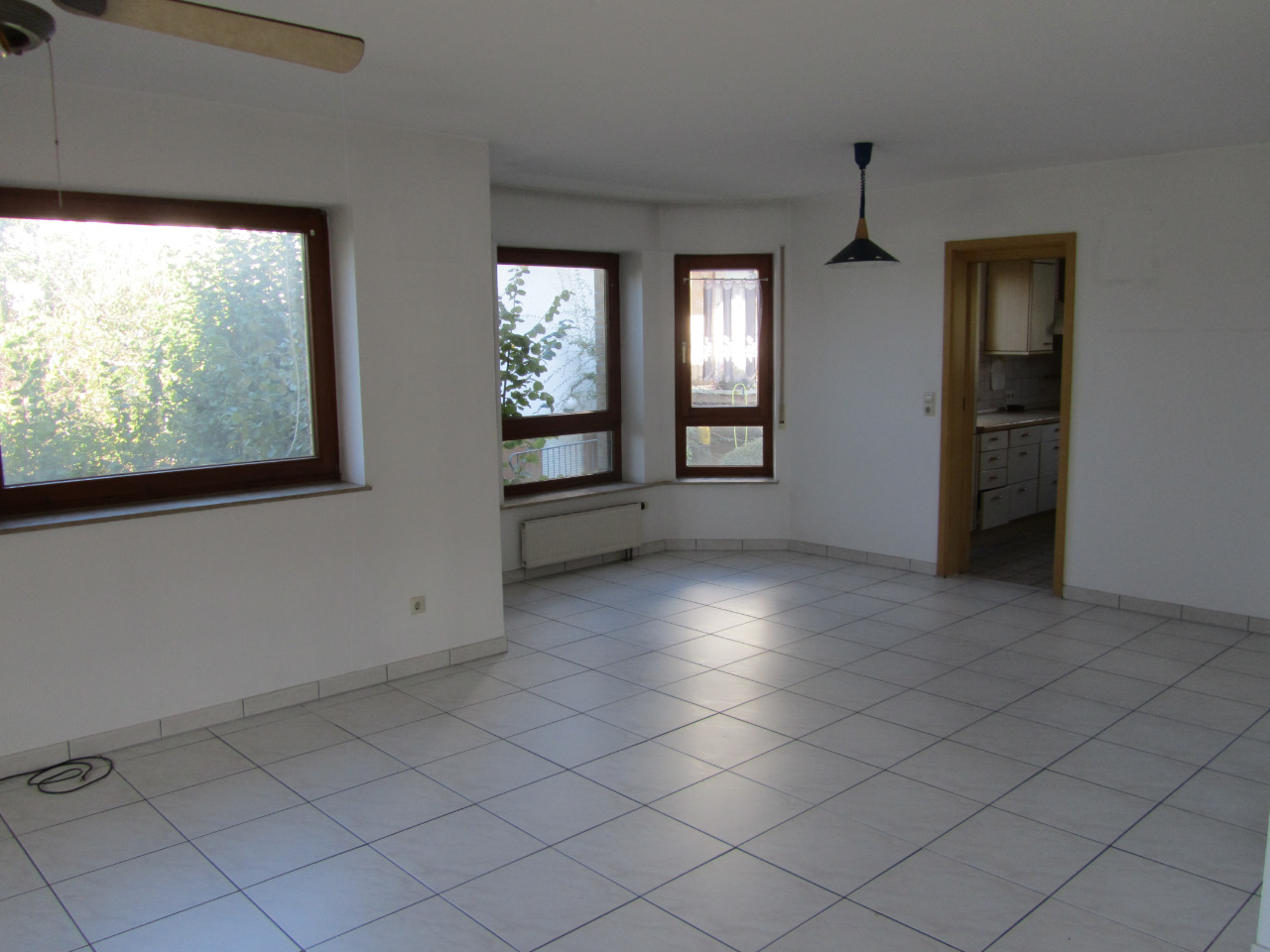 Eine Wohnung im unbewohnten Zustand, wie sie häufig bei Wohnungsbesichtigungen anzutreffen ist